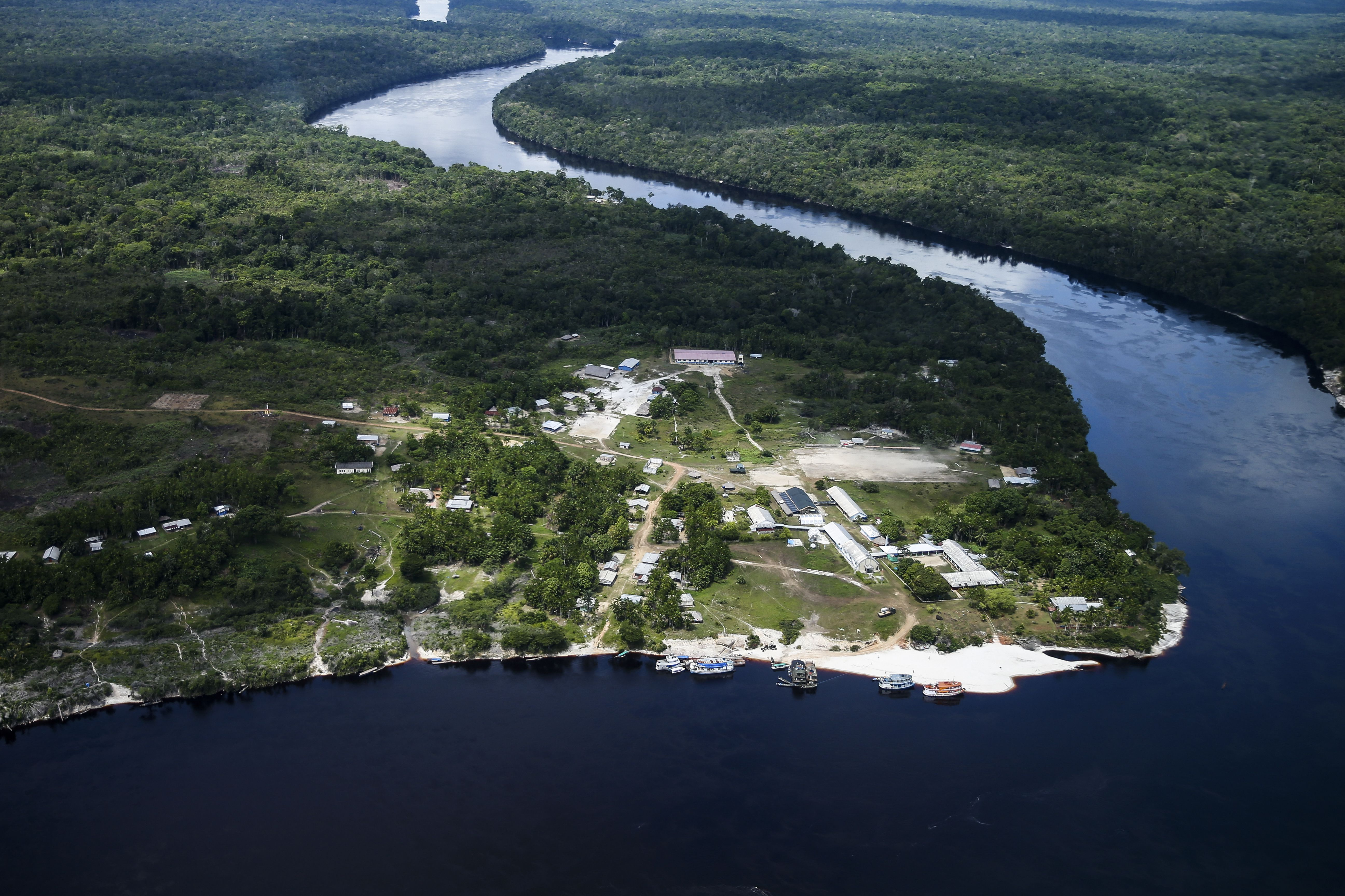 Vista aérea da comunidade de Assunção do Içana, no município de São Gabriel da Cachoeira (AM), na região do Alto Rio Negro (Marcelo Camargo/Agência Brasil)